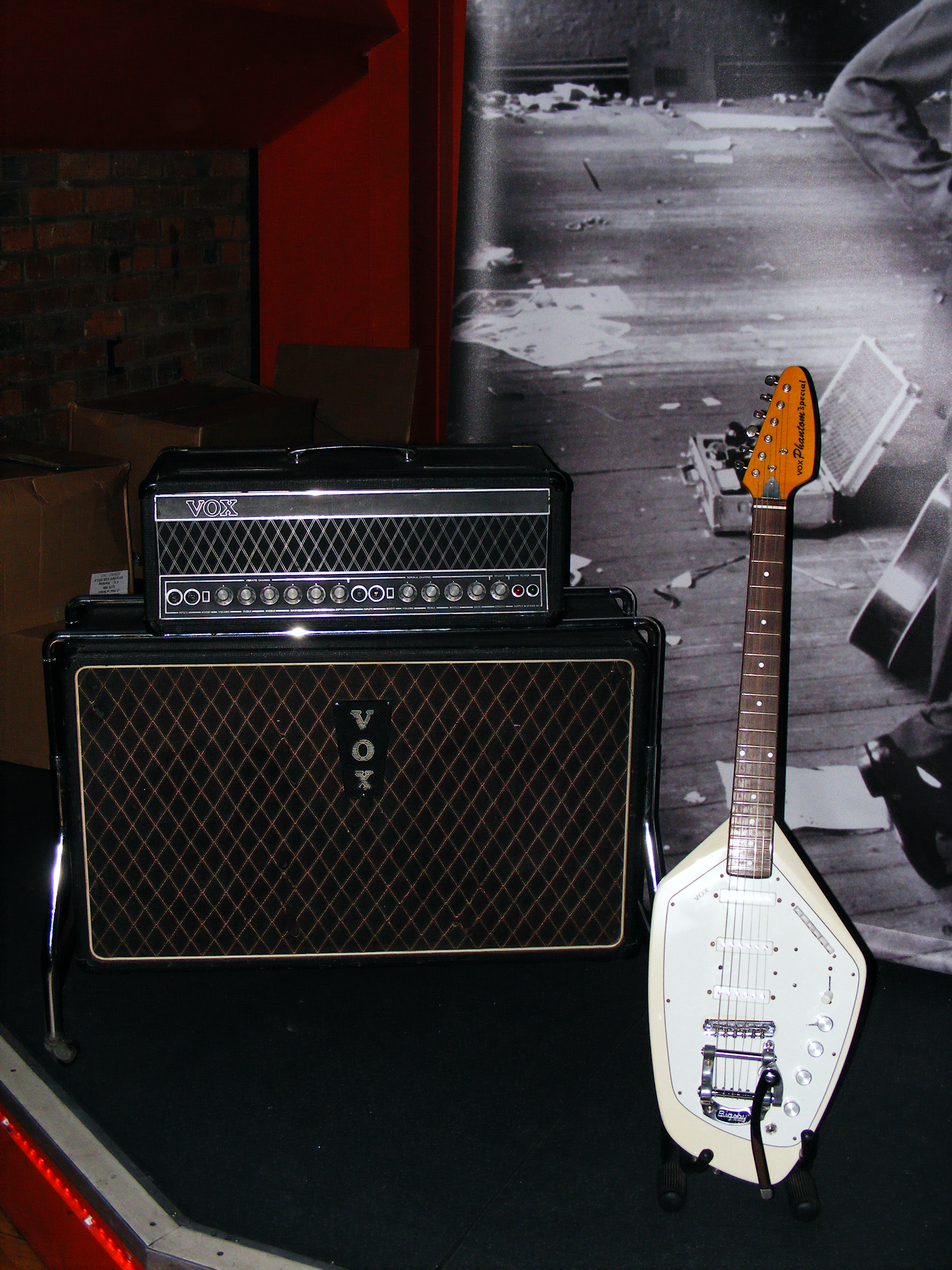 Equipo original de Ian Curtis.